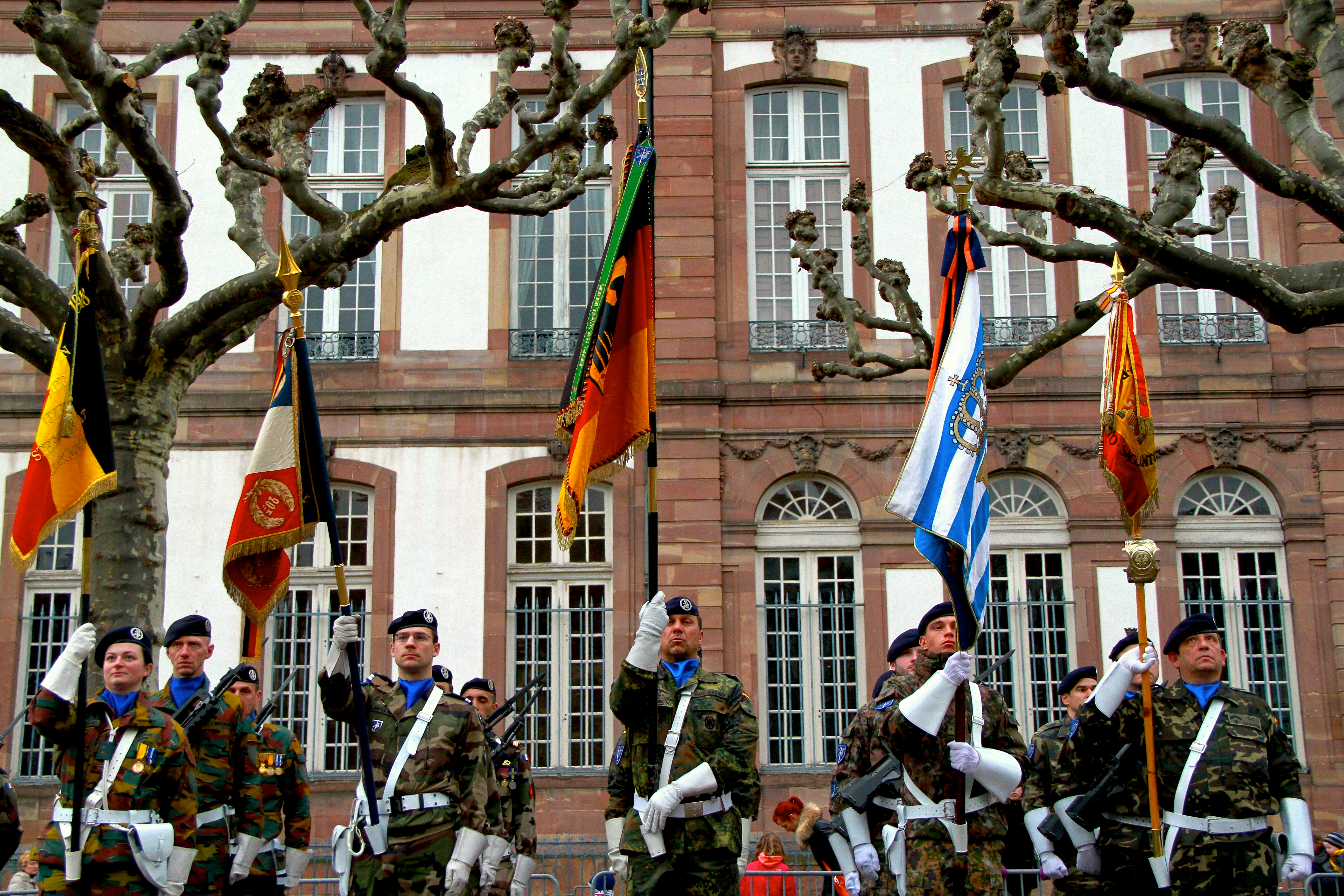 Eurocorps prise d’armes de fin de mission en Afghanistan, place Broglie à Strasbourg 31 janvier 2013, en présence de M. Pieter De Crem, ministre belge de la Défense, et de M. Kader Arif, ministre délégué auprès du ministre de la Défense, chargé des Anciens Combattants.